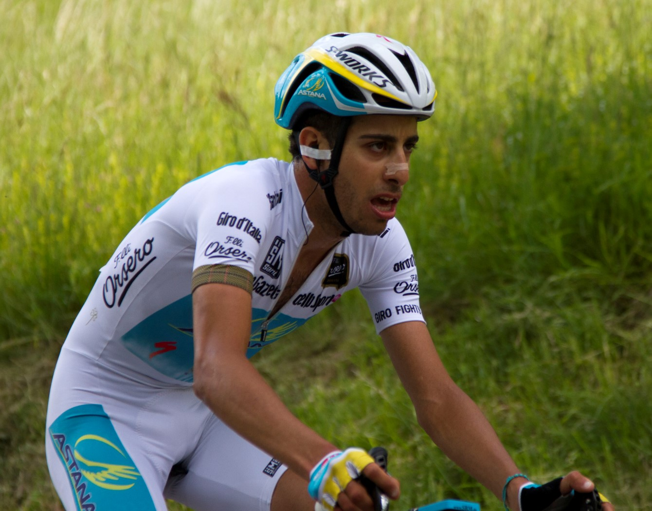 348 aru